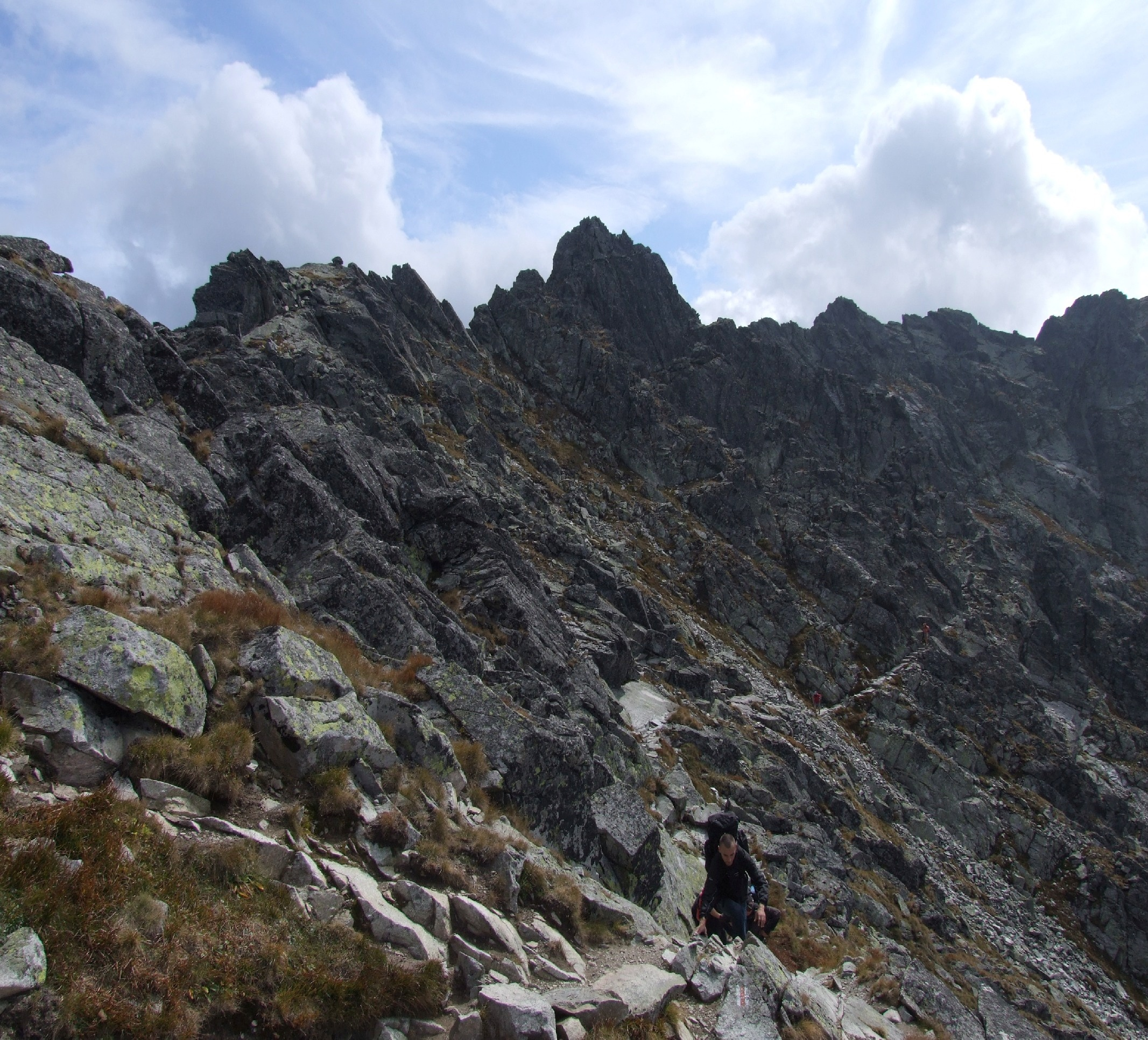 Czarne Ściany i szlak Orlej Perci